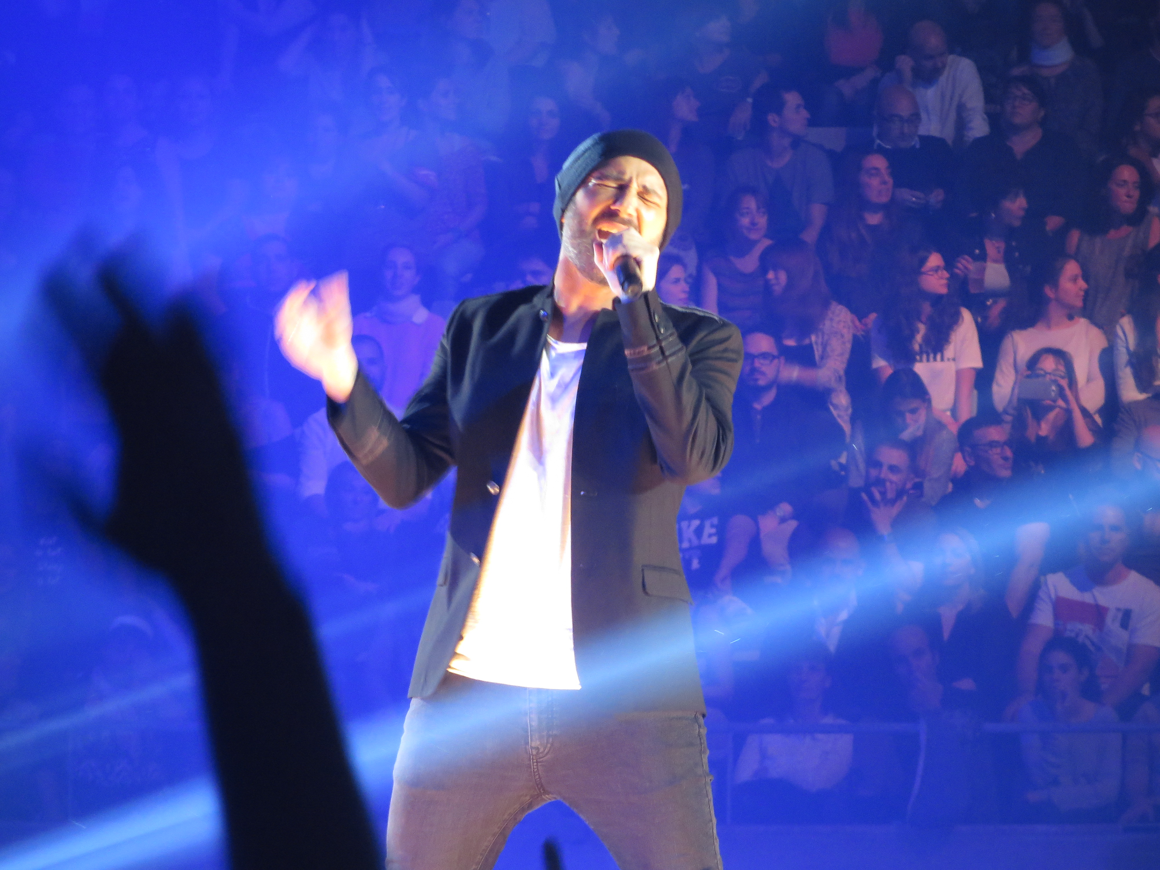 Actuación de Alejandro Parreño en el concierto conmemorativo del 15 aniversario de OT en el Palau Sant Jordi de Barcelona (31-10-2016)